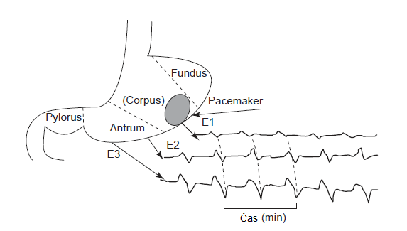 Anatomie žaludku a počátek žaludeční myoelektrické aktivity